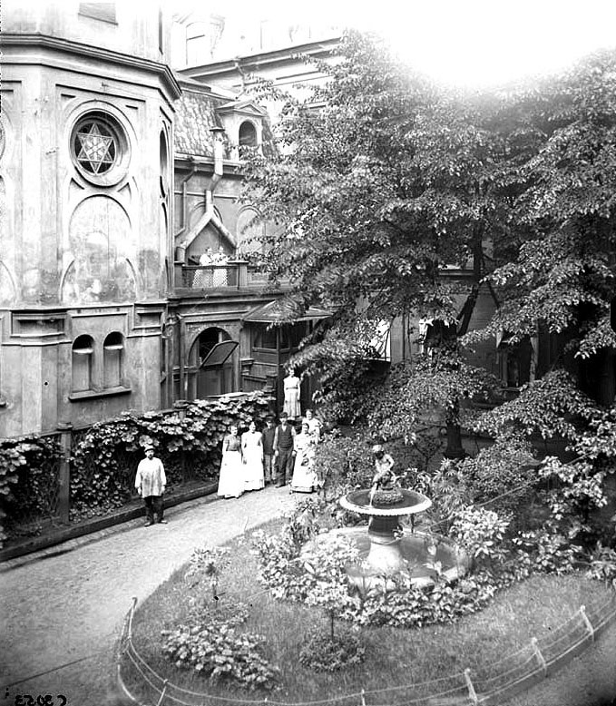 Gårdsinteriör och personal vid Malmtorgsbadet, Malmtorgsgatan 3. Fotonummer Fa 50342